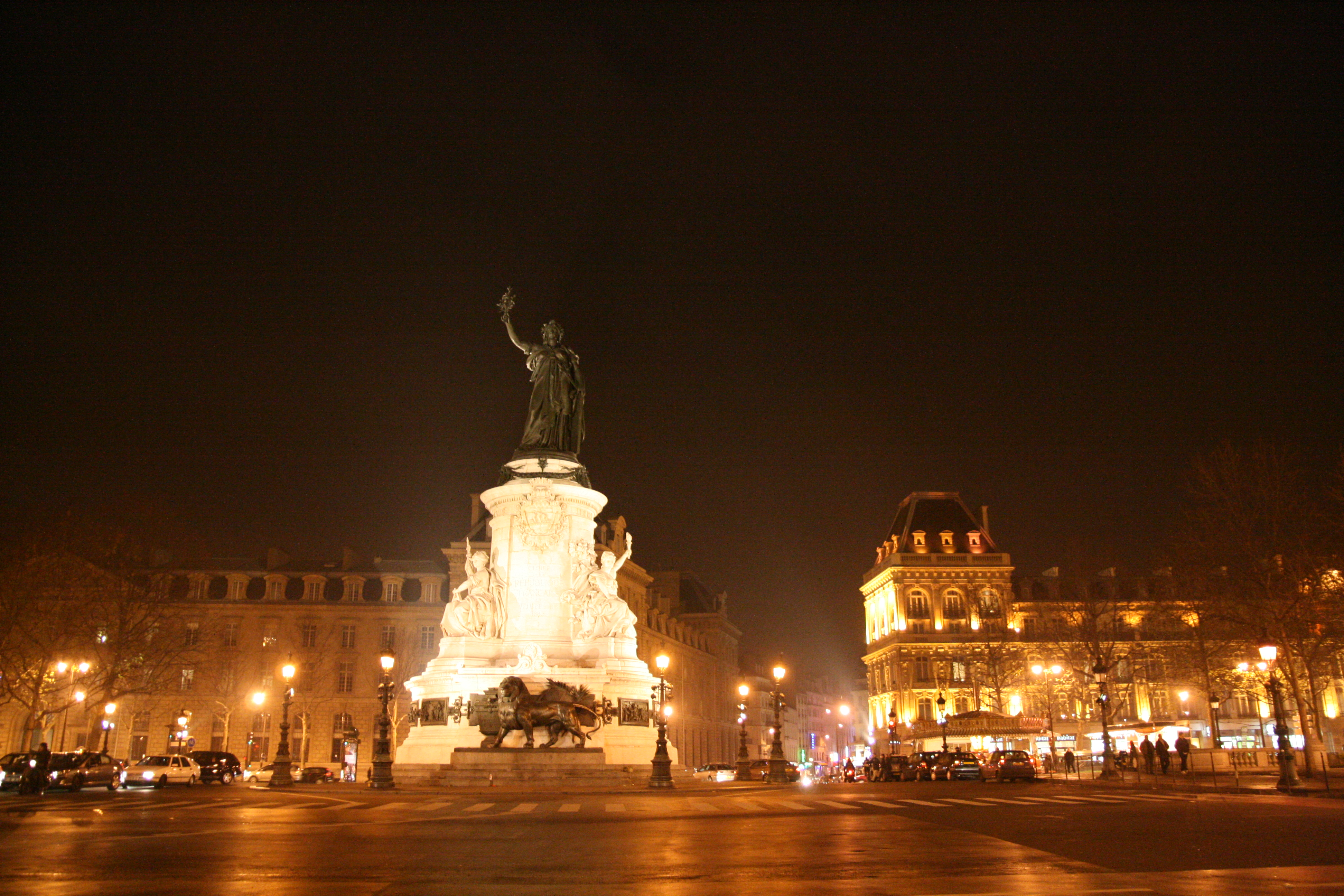 Place de la République, Paris